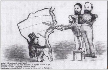 Patricio Ibarra Cifuentes escribe: Coronado por los laureles de las victorias navales, el presidente de Chile Aníbal Pinto, premunido de una gran tijera y sobre un piso, precisa hasta donde estima se anexará durante la campaña terrestre próxima a comenzar. Le observan los mandatarios Mariano Ignacio Prado del Perú, Hilarión Daza de Bolivia y Nicolás Avellaneda de Argentina. Ante los planes del chileno el primero le dice que no le quedará territorio alguno, pues Pinto comienza a cortar desde Lima hacia el sur. Por su parte el jefe boliviano reclama ante la intención de apropiarse también de Tacna y el argentino le advierte no hacer lo propio con su Patagonia, cuyo territorio aun mantenía en disputa con Chile.